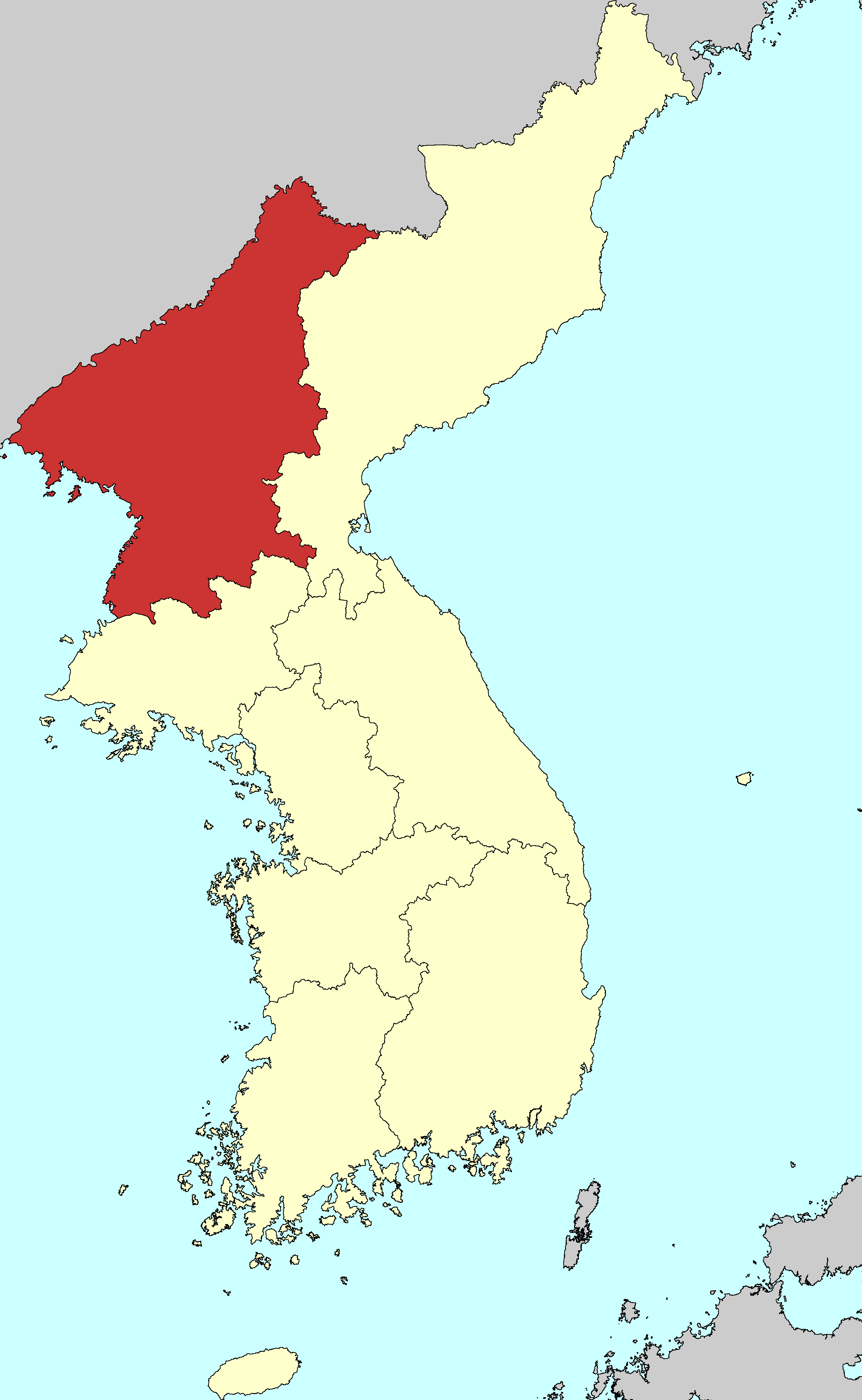 조선후기 평안도